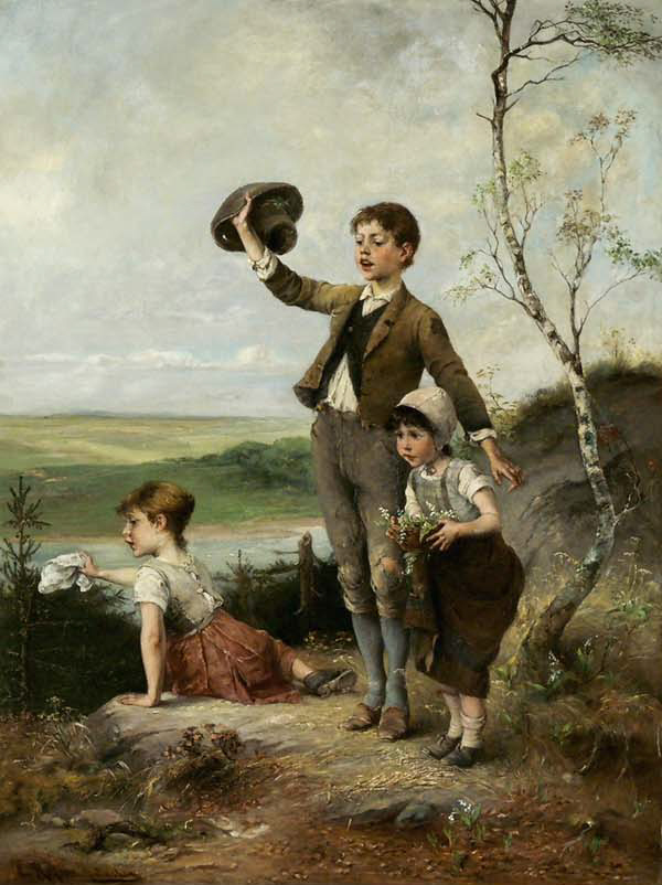 "Maikäfersammeln auf einem Berggipfel". Öl auf Leinwand, 85 x 65 cm, signiert